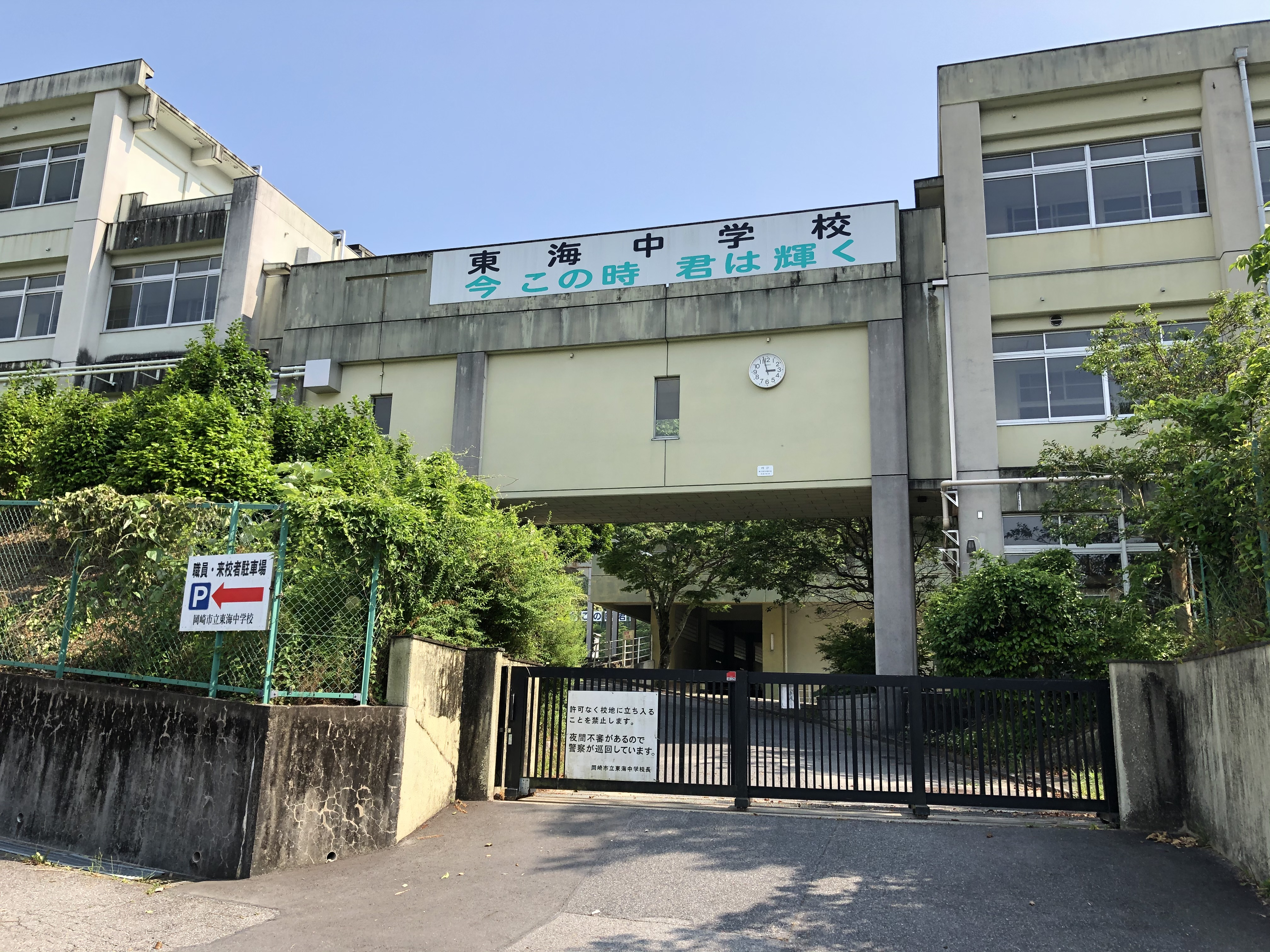 岡崎市立東海中学校（岡崎市山綱町）